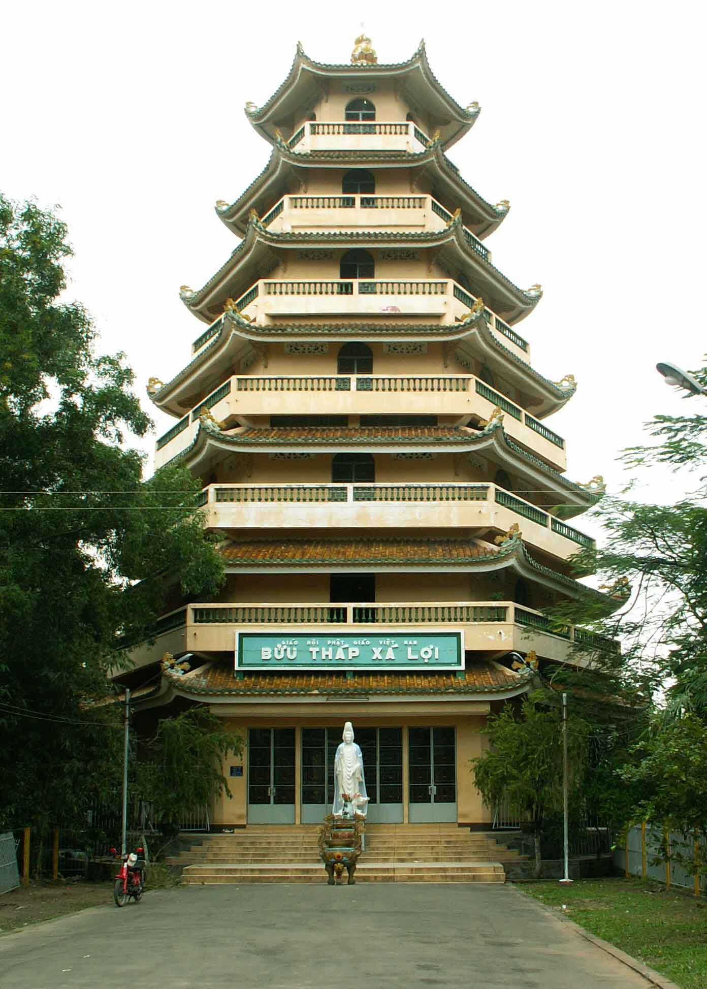 Chùa Giác Lâm, thành phố Hồ Chí Minh. Hình này do Phan Ba tự chụp vào tháng 12 năm 2005 và đưa vào phạm vi công cộng.